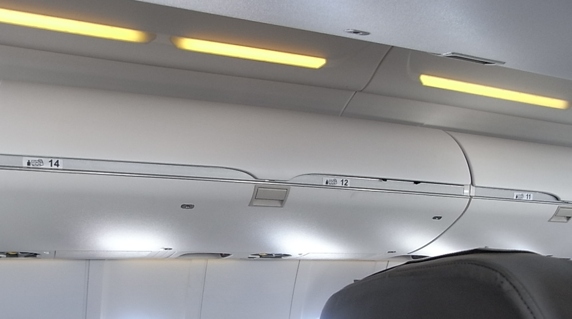 Aviadilo, en kiu ne ekzistas seĝovico inter la 12-a kaj la 14-a